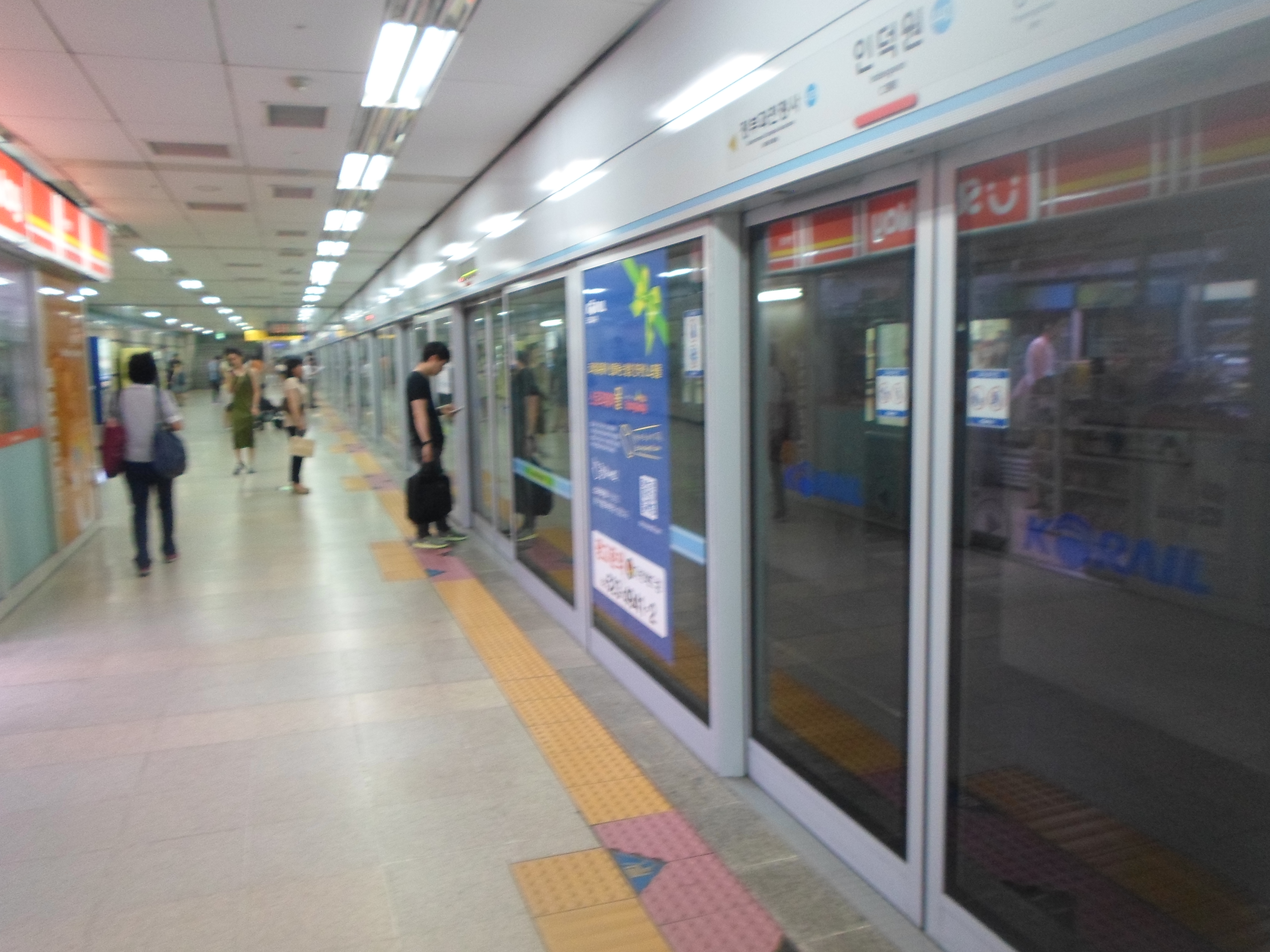 인덕원역 승강장